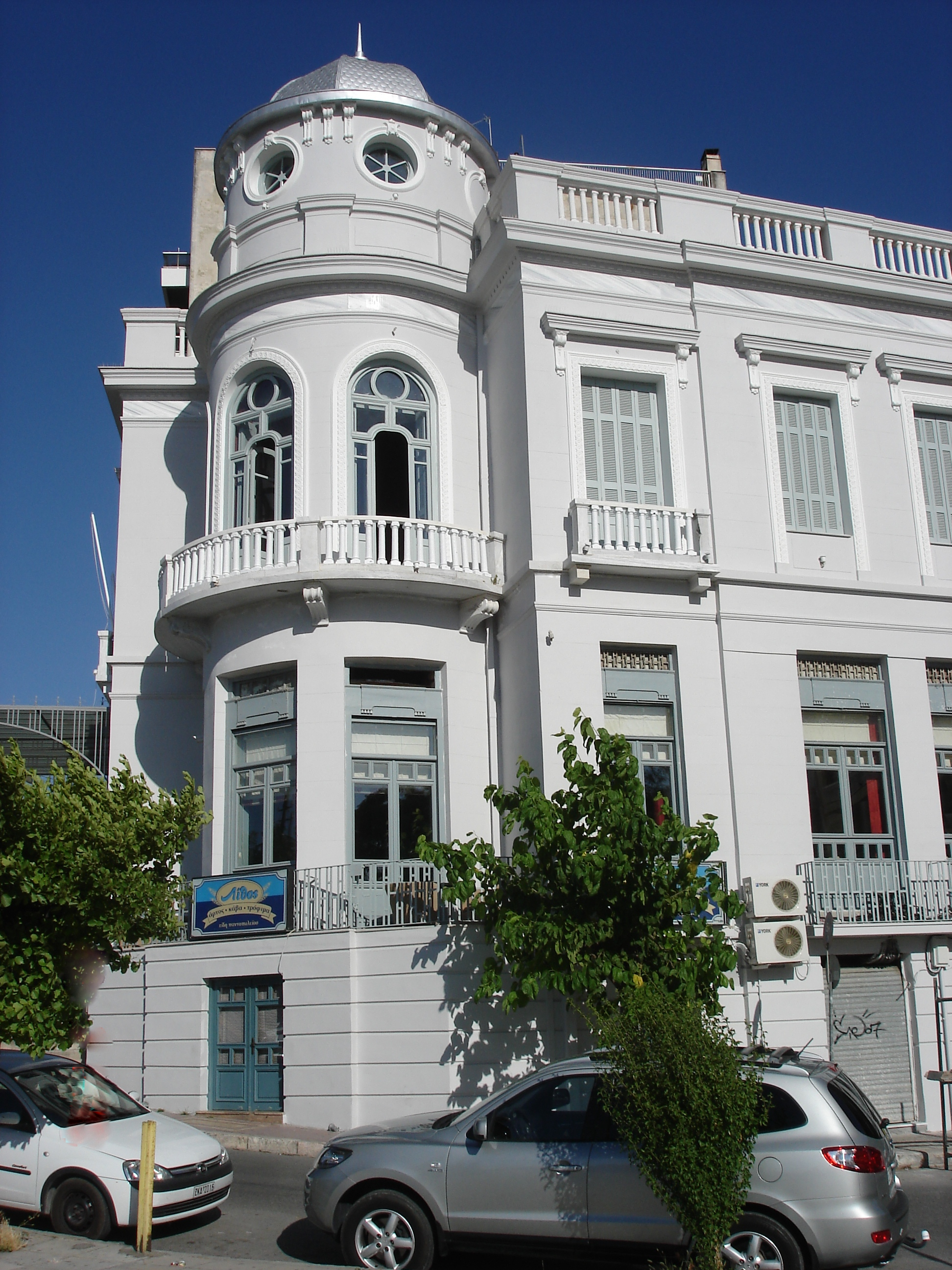 Alampra, Patras